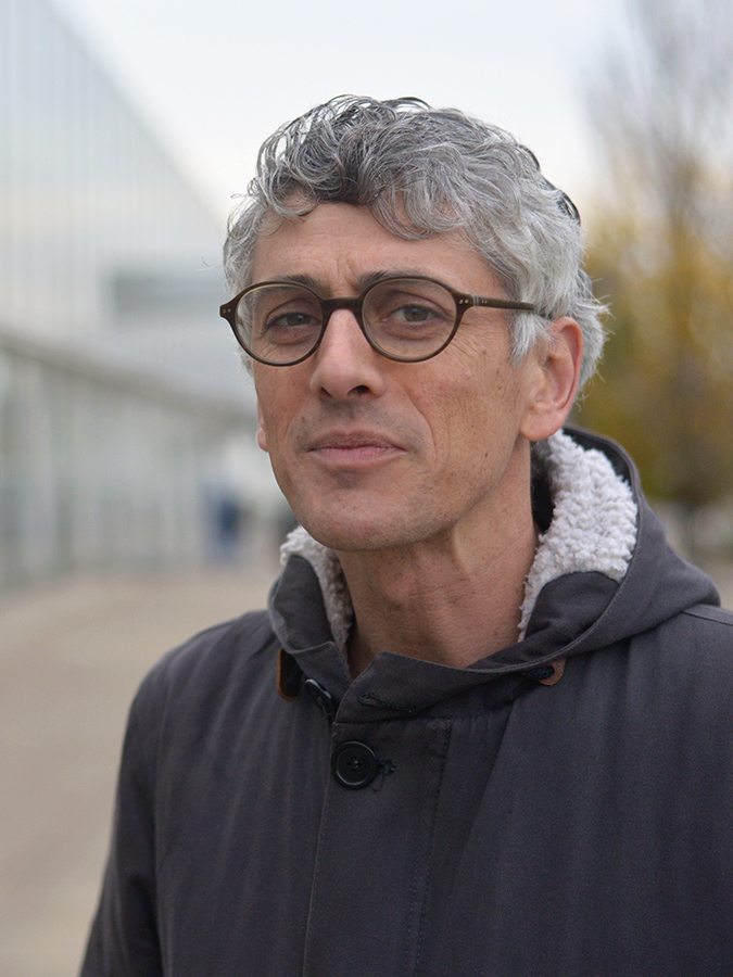 L'auteur de bande dessinée Cyril Pedrosa en 2015.